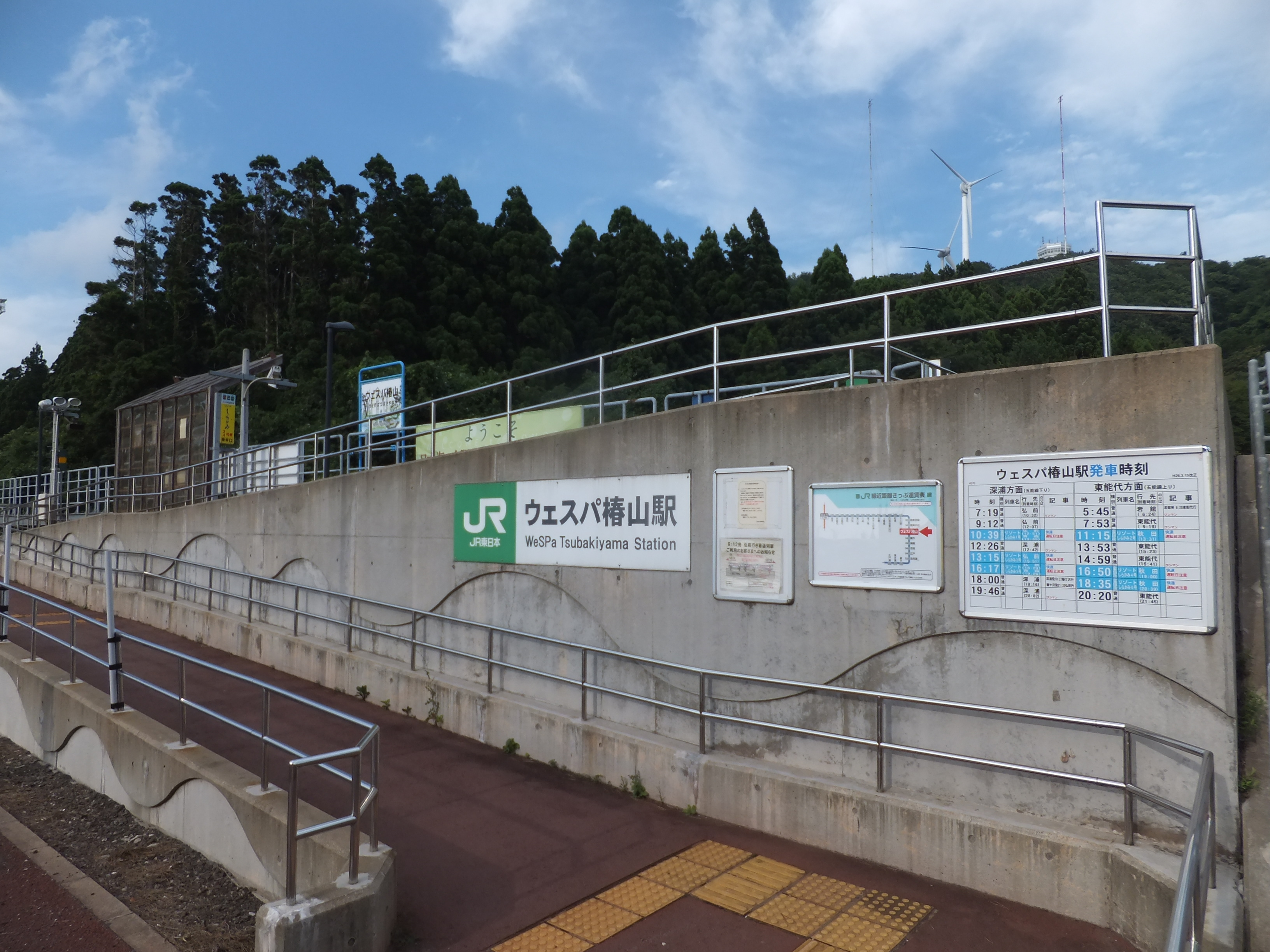 五能線・ウェスパ椿山駅